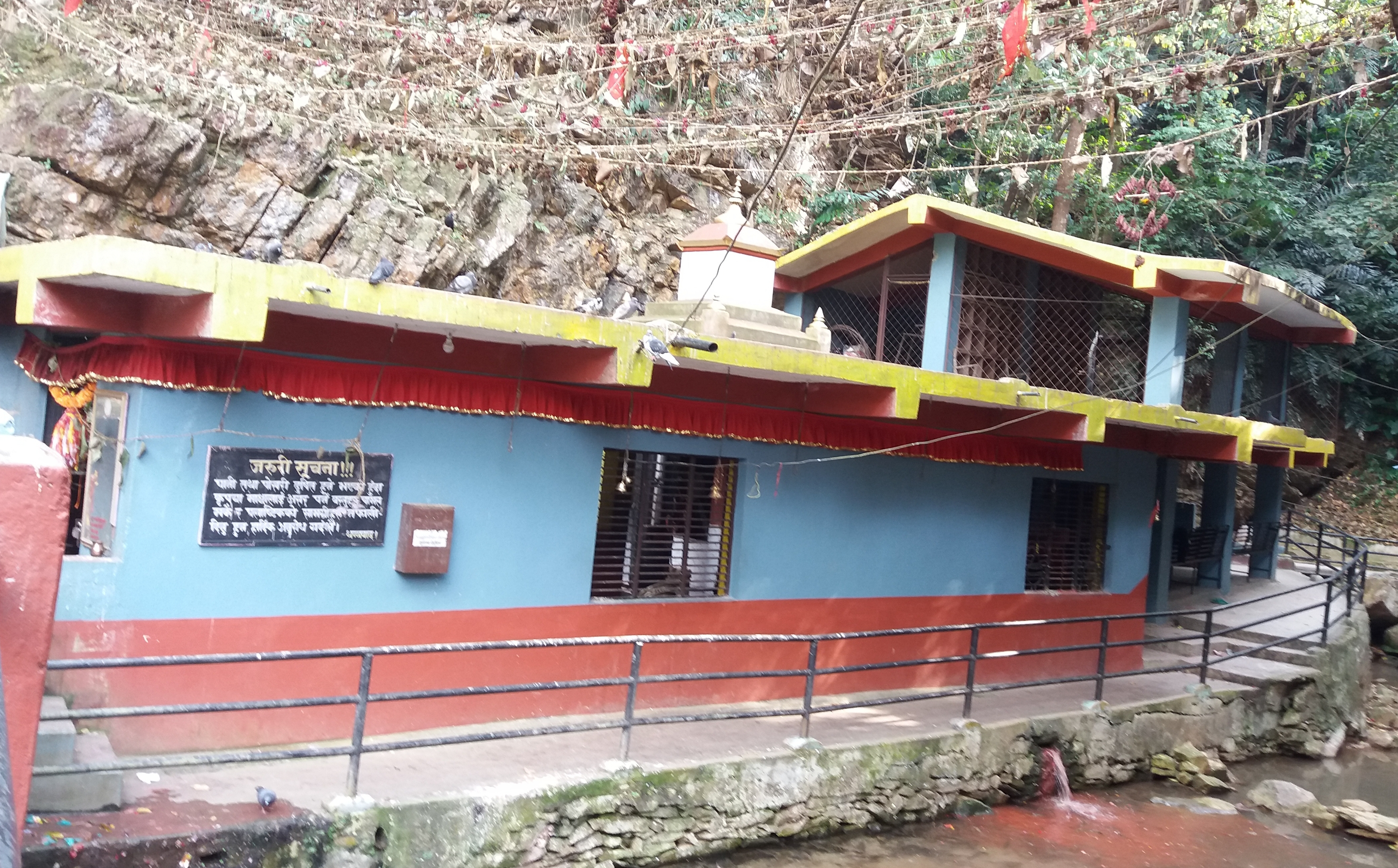 नेपाली: छाब्दि बराहि मन्दिरको मुख्य मन्दिर